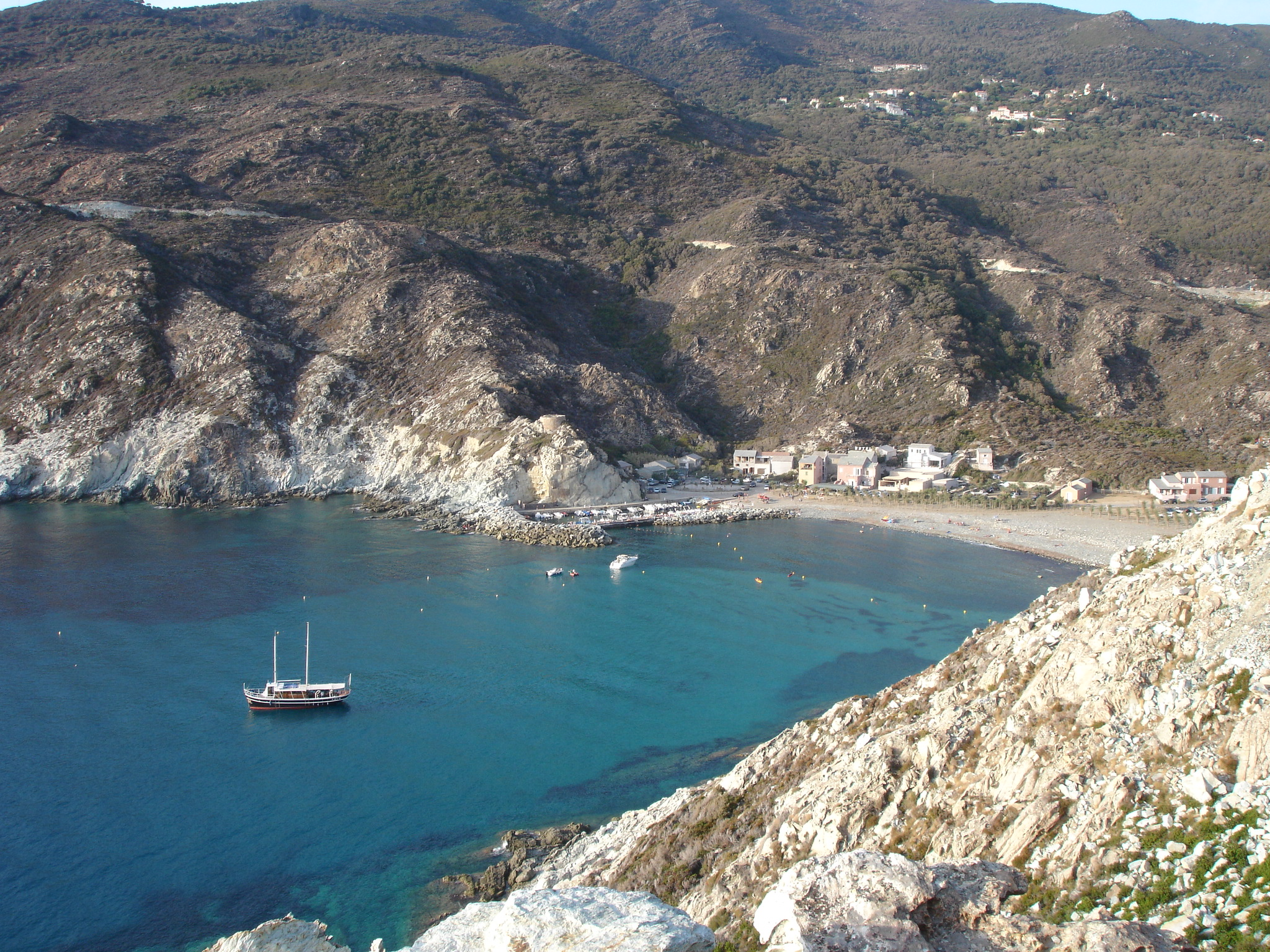 France, Haute-Corse (2B), Barrettali, marine de Giottani